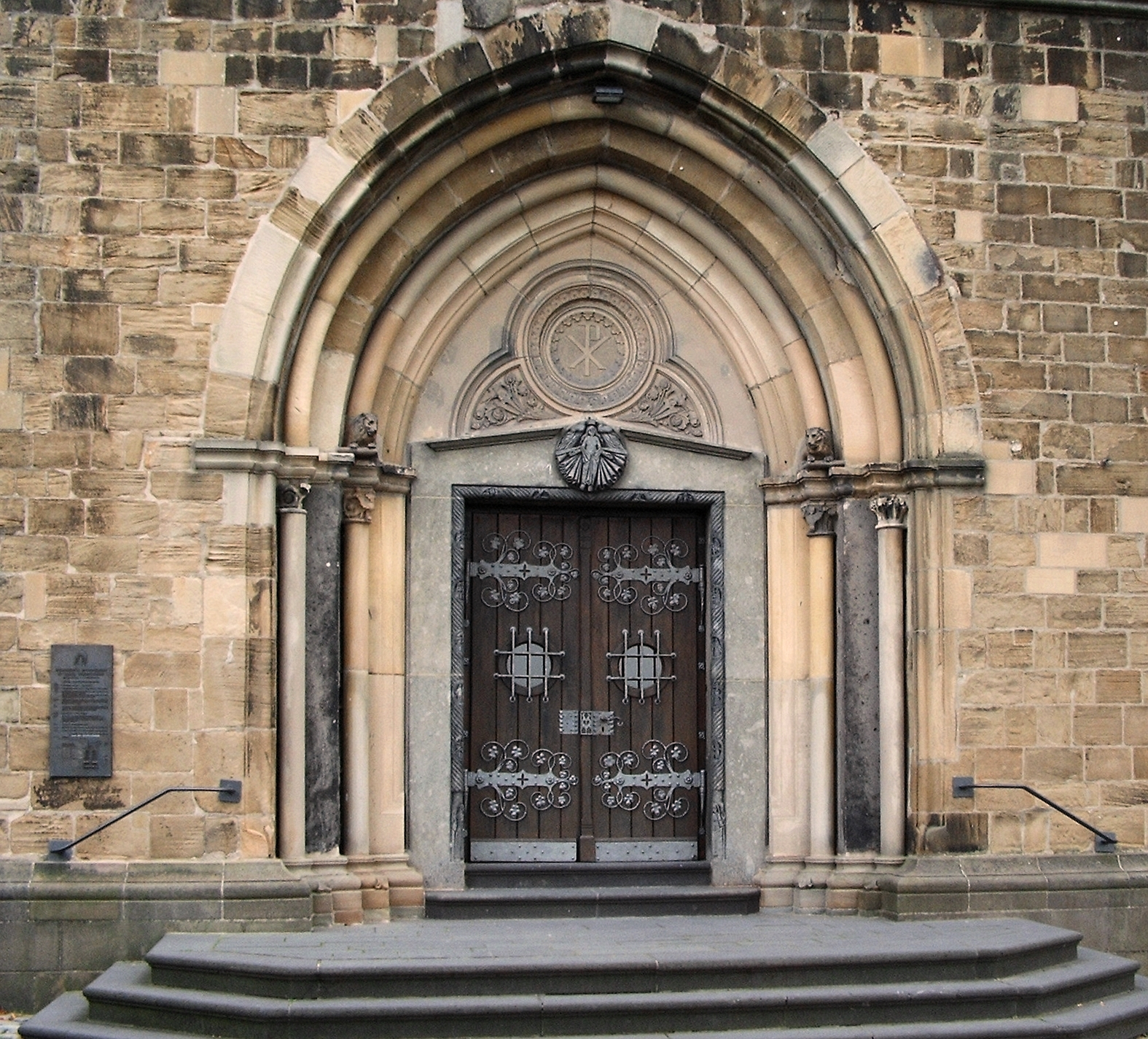 Portal der Kirche St.Mariä am Gräfrather Markt / Detail